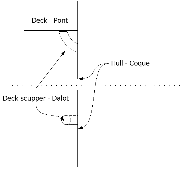 Deck scupper - Dalot de pont